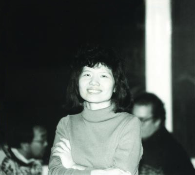 Fan Chung at Oberwolfach